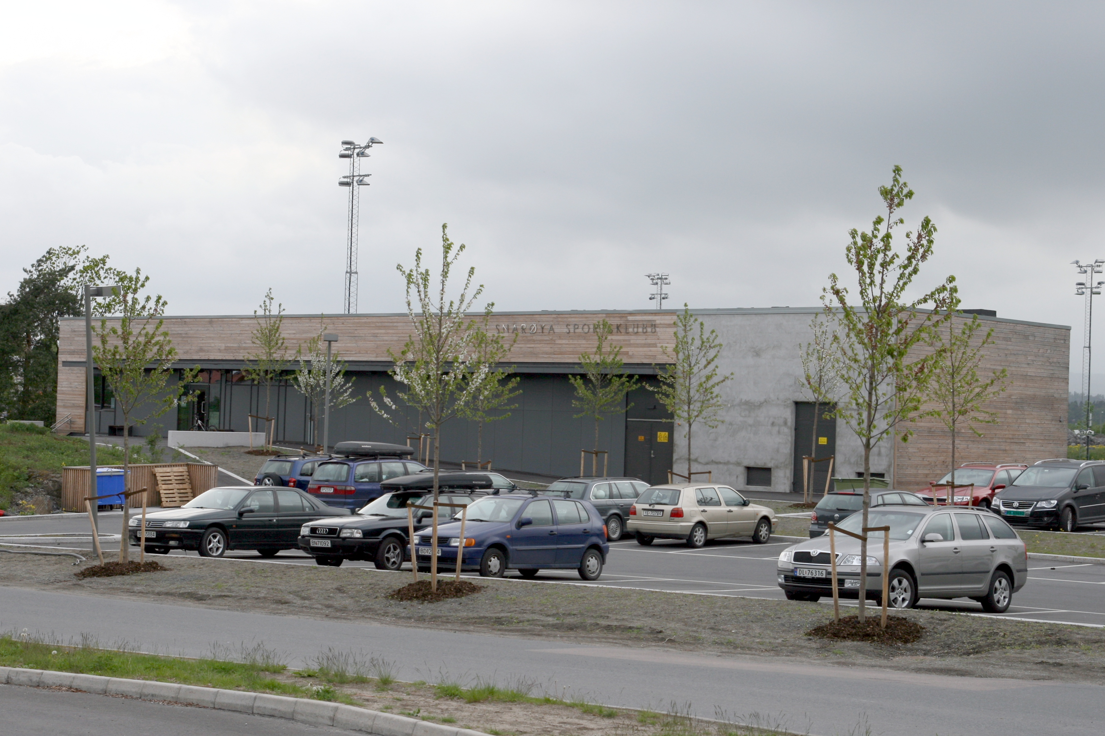 Klubbhuset til Snarøya Sportsklubb.